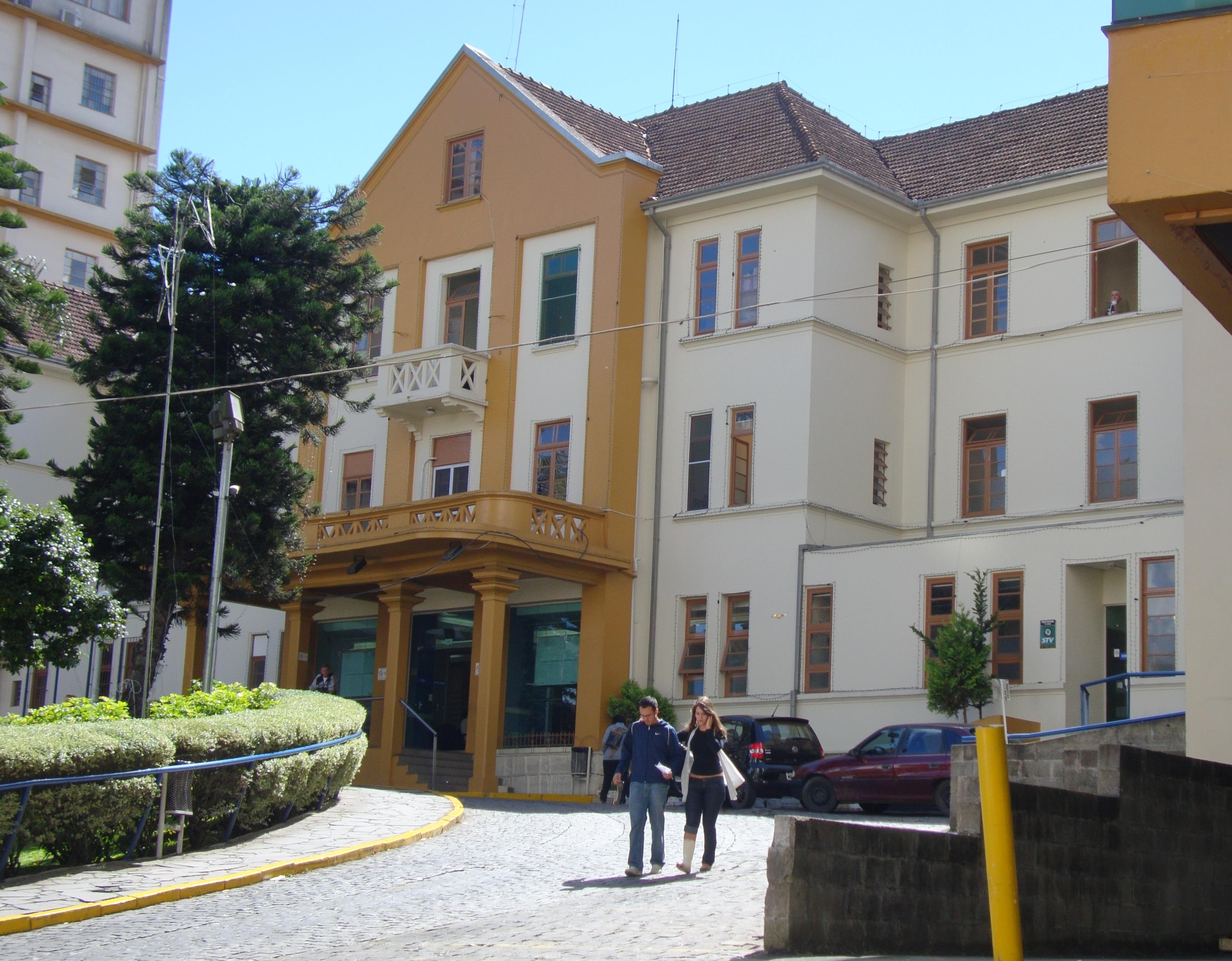 Hospital Pompéia em Caxias do Sul